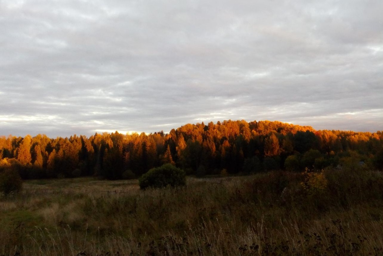 Лето 2018 г.